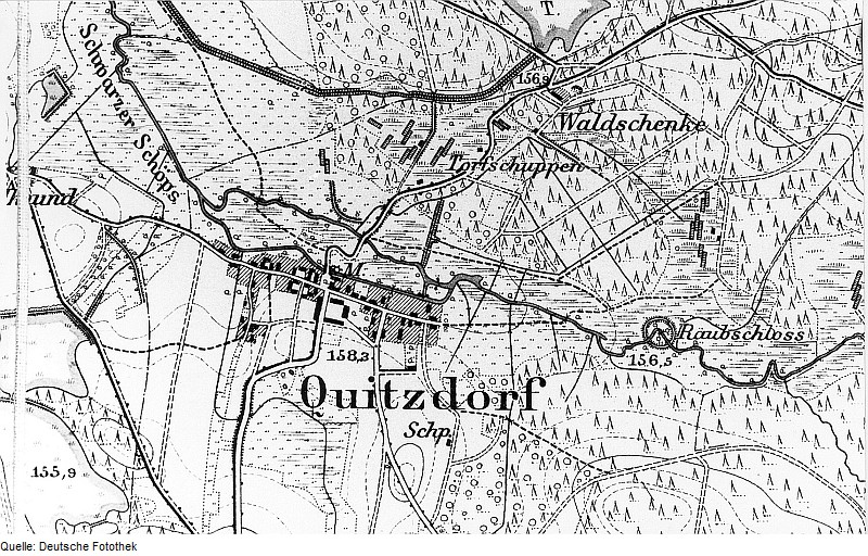 Original image description from the Deutsche Fotothek Quitzdorf am See. Meßtischblatt, 1:25.000, Sekt. Niesky, 1886